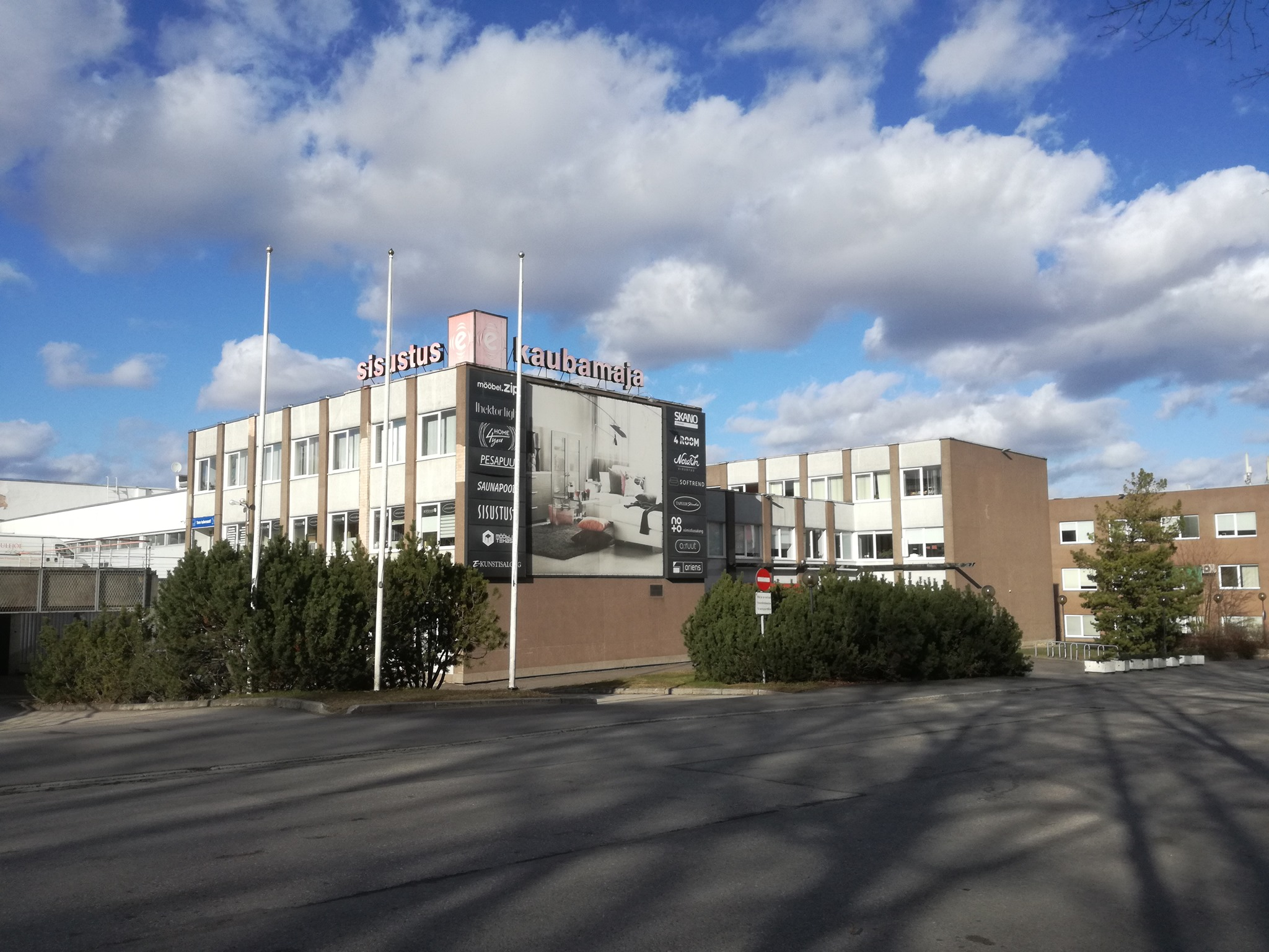 Tehase 16 Sisustus E Kaubamaja